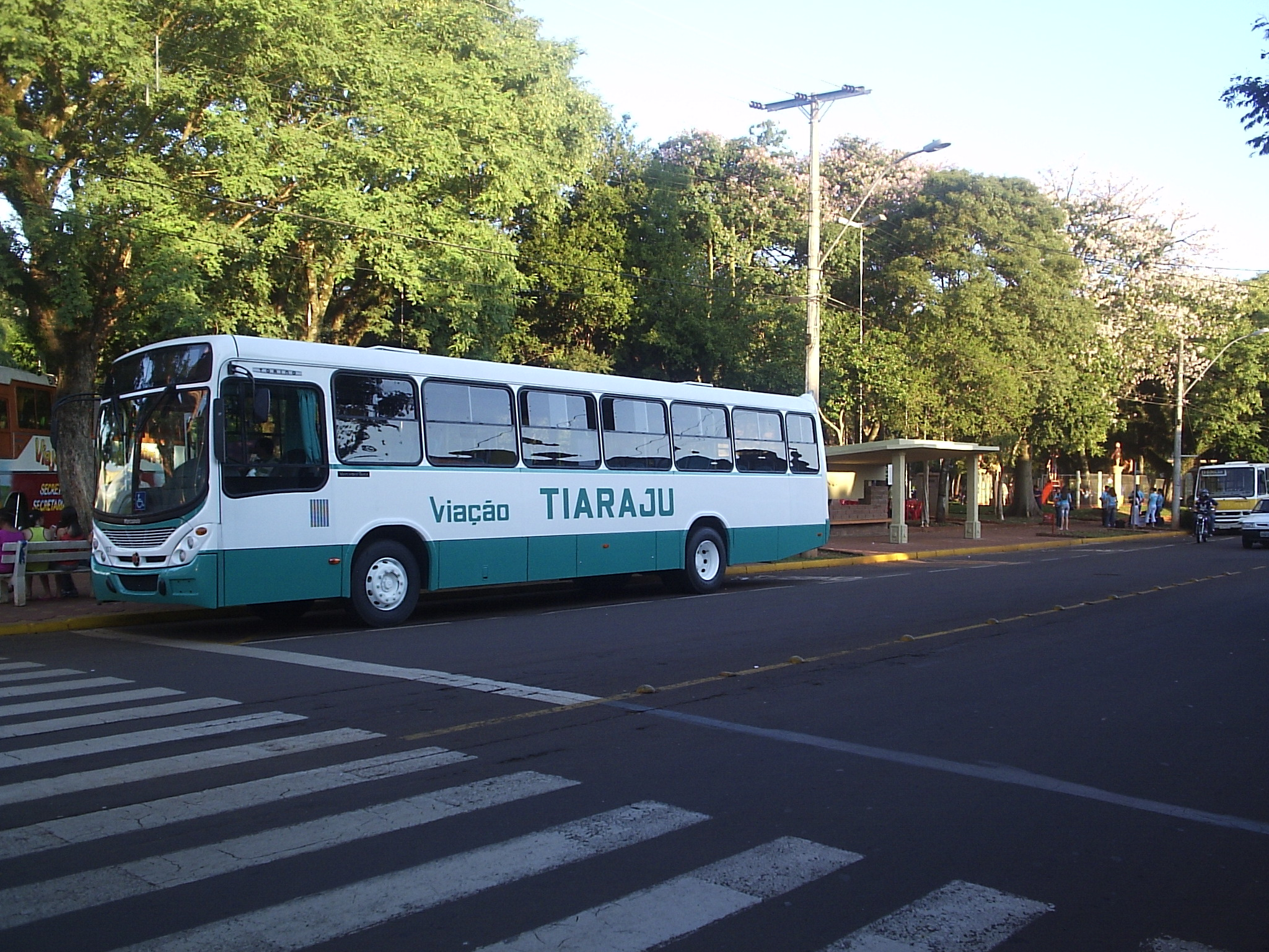 Ônibus da Viação Tiaraju estacionado em Santo Ângelo, Rio Grande do Sul.